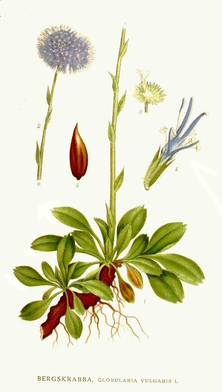 Original Description Bergskrabba, Globularia vulgaris L.